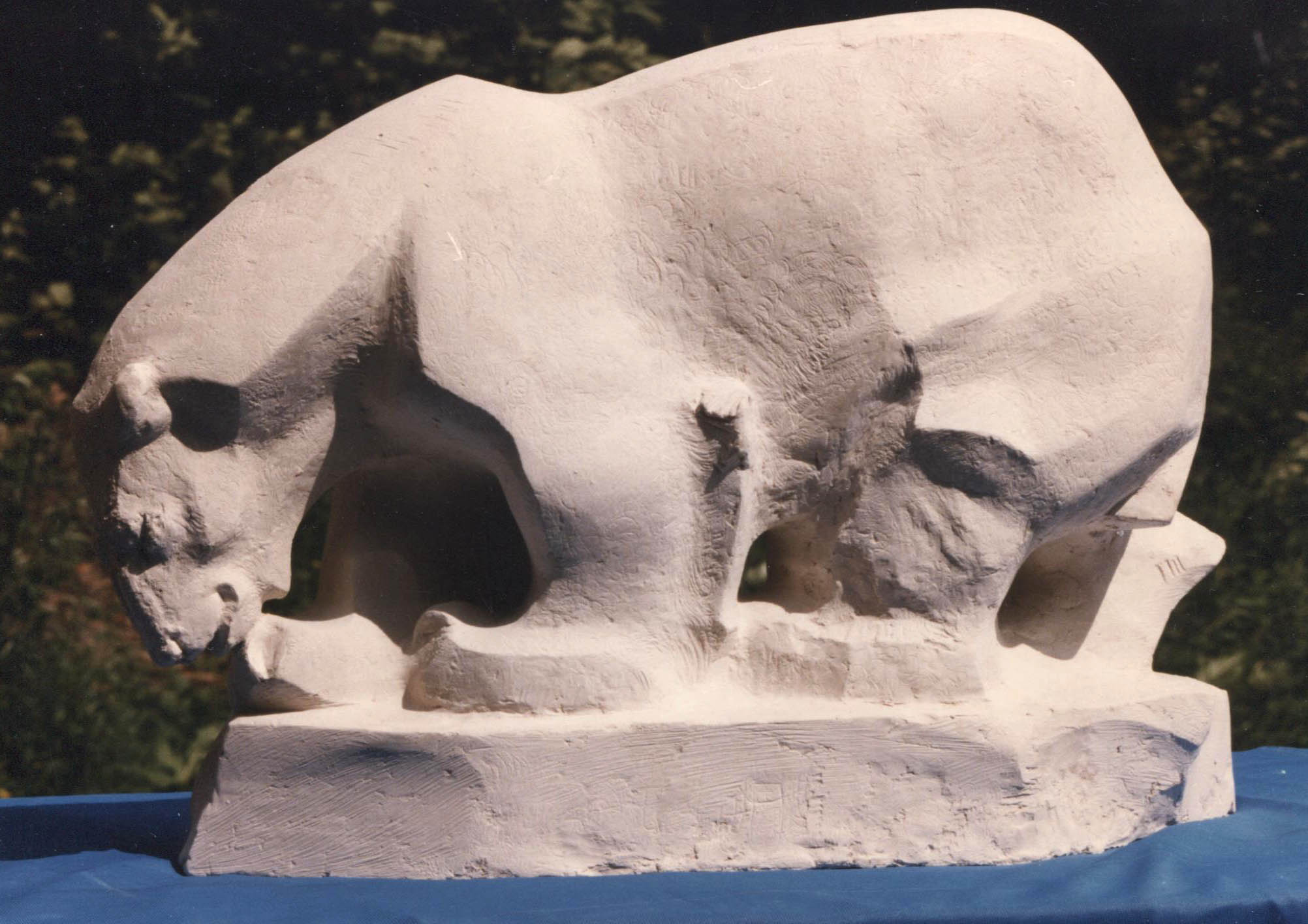 Работа скульптора-художника Николаева Е.В.